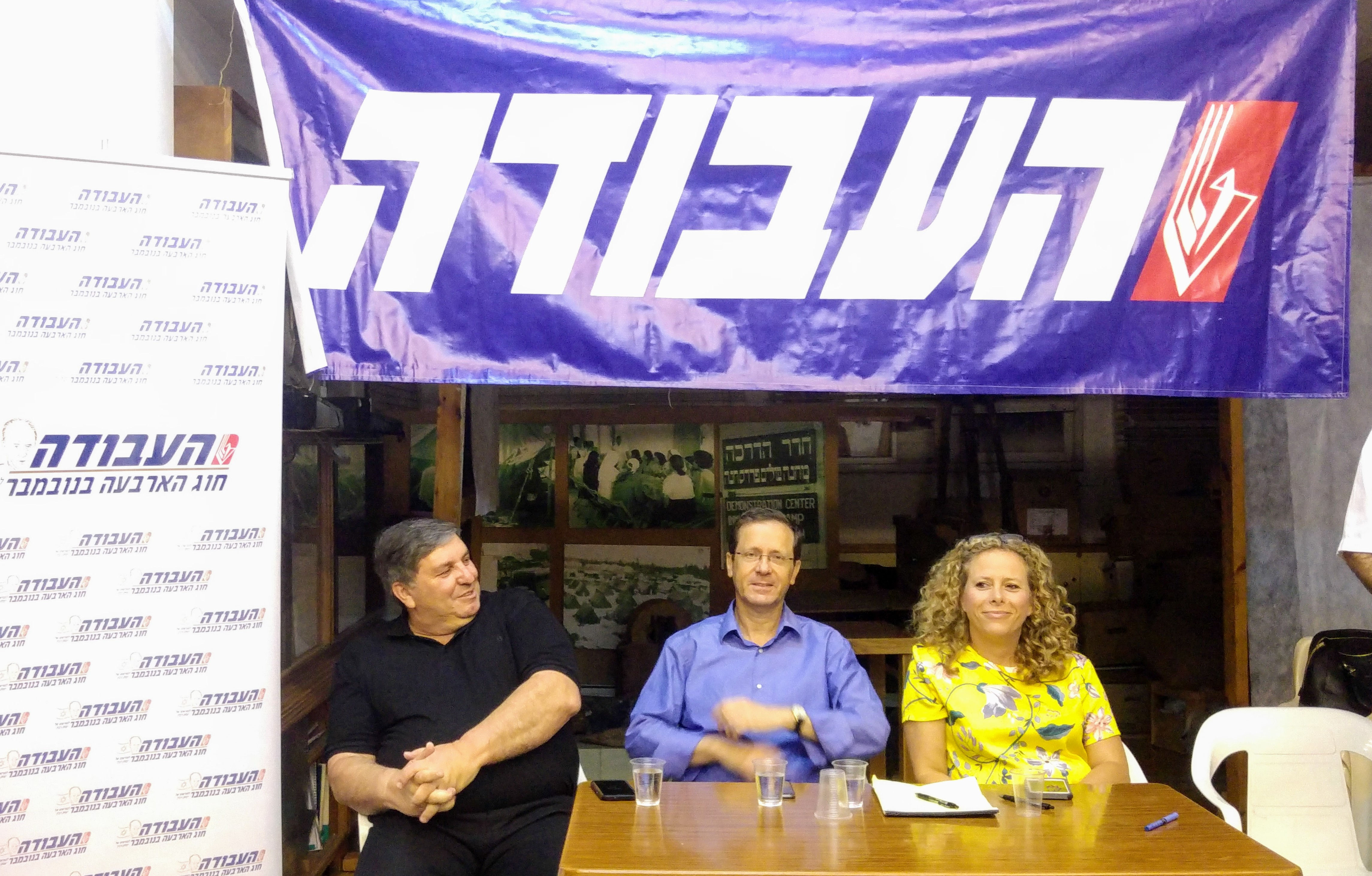 יצחק הרצוג, יושב ראש מפלגת העבודה וחבר כנסת מטעמה, יחד עם דני עטר, יושב ראש קרן קיימת לישראל, ואיילת נחמיאס-ורבין, חברת הכנסת העשרים מטעם הסיעה, במפגש בסניף המקומי בפרדס חנה